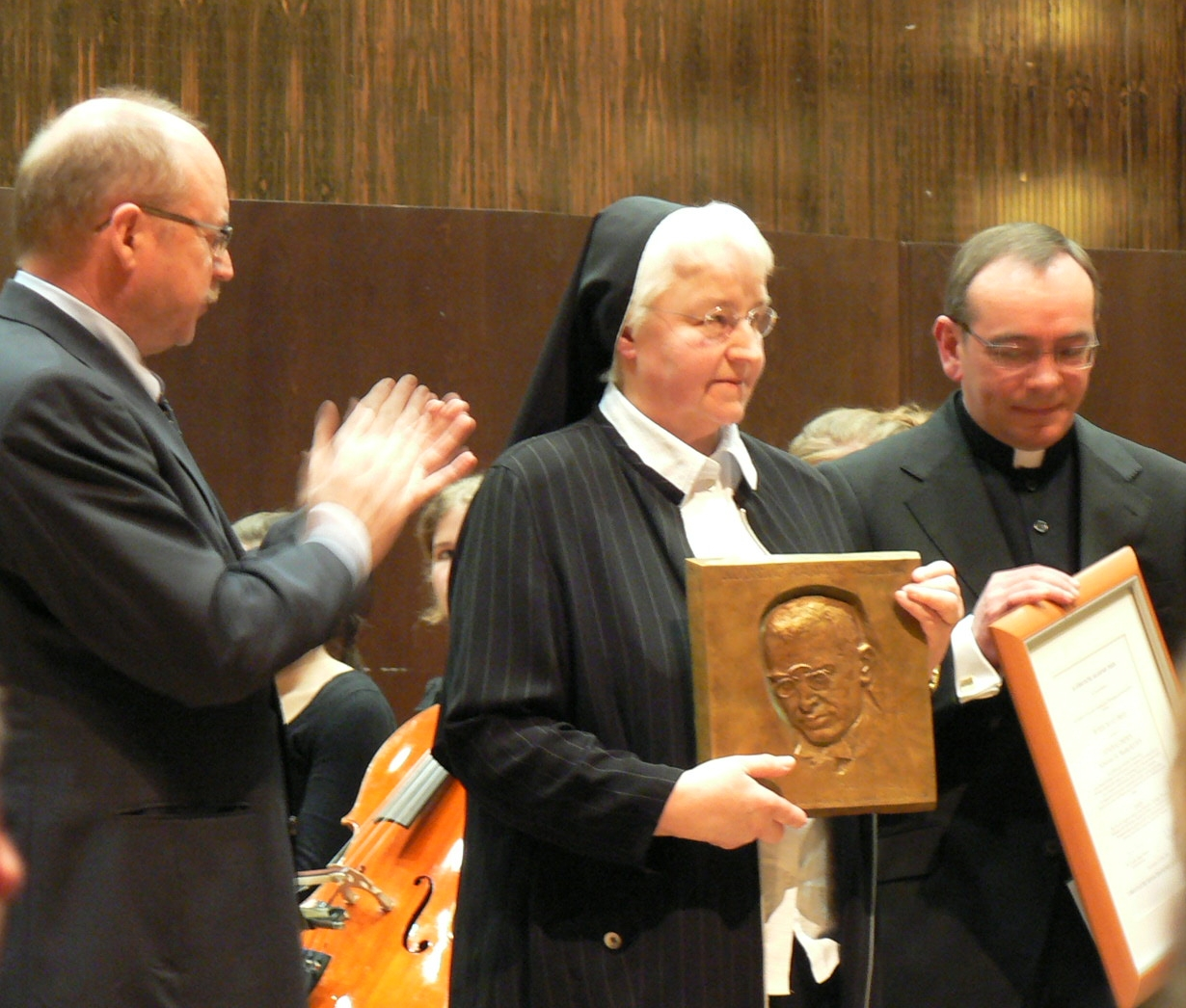 Verleihung des Peter-Wust-Preises 2009 an Sr. M. Basina Kloos FBMVA; rechts Dr. Jürgen Doetsch, Direktor der Katholischen Kademie Trier, mit der Verleihungsurkunde, links Gisbert Eisenbarth, Leiter der CEB Merzig (Christliche Erwachsenenbildung); die Vertreter der beiden verleihenden Institutionen.